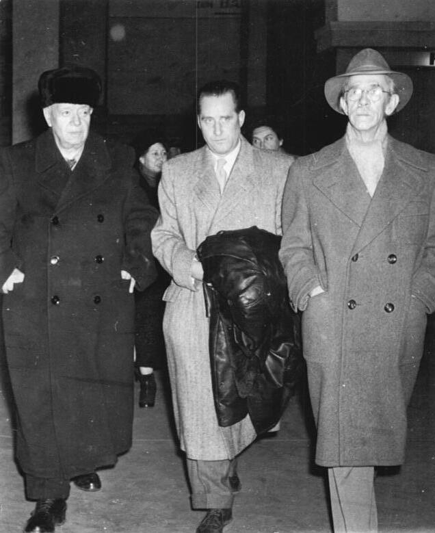 Zentralbild Weiß 22.3.1956 Der mexikanische Maler Diego Rivera kam nach Berlin Der mexikanische Maler Diego Rivera ist am 21.3.56 auf dem Berliner Ostbahnhof eingetroffen. Der mexikanische Gast wird in Berlin unter anderem seine Urkunde als korrespondierendes Mitglied der Akademie der Künste erhalten. UBz: Nach der Ankunft auf dem Ostbahnhof (vlnr) Diego Rivera, der Direktor der Akademie der Künste, Engel und der Vizepräsident der Akademie der Künste, Nationalpreisträger Prof. Otto Nagel.